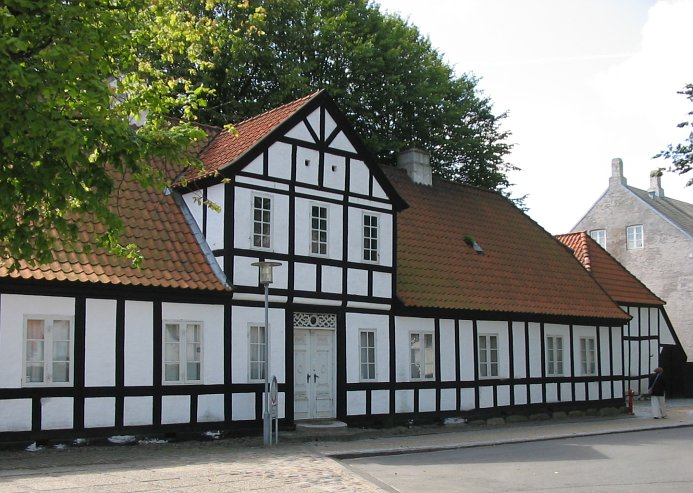 Vendsyssel historiske museum i Hjørring